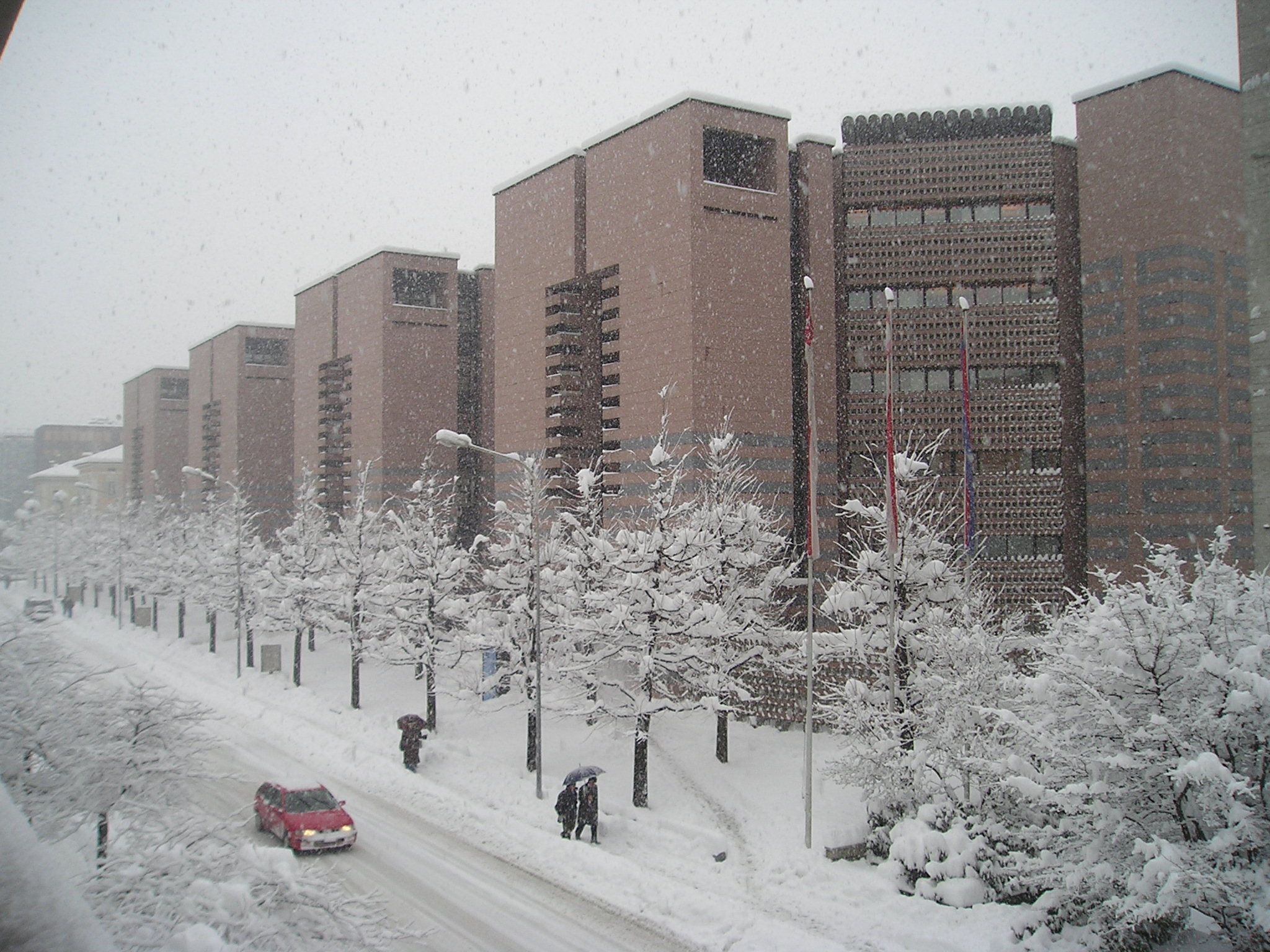 L'edificio della Banca del Gottardo a Lugano progettato dall'arch. Mario Botta ripreso in occasione della nevicata eccezionale del 27.01.2006; autore:Massimo Macconi